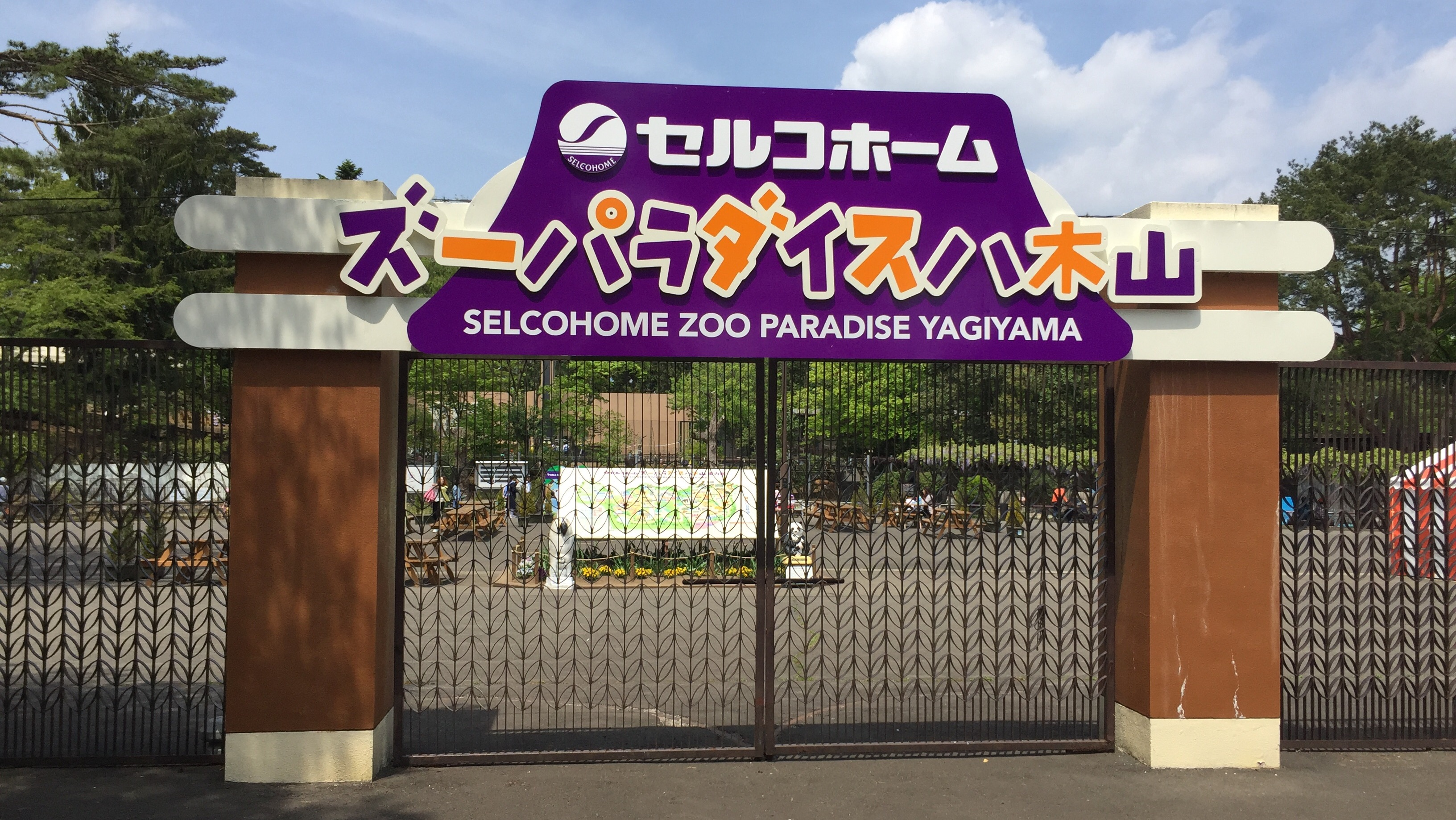 セルコホームズーパラダイス八木山（仙台市八木山動物公園）